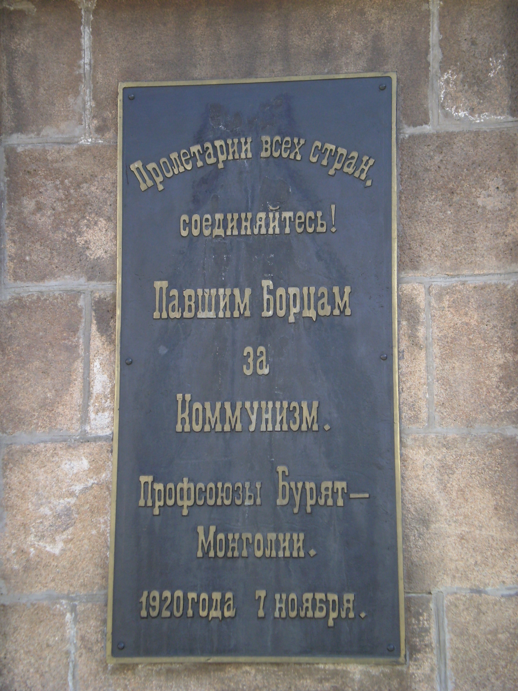 Памятник павшим в борьбе за коммунизм.